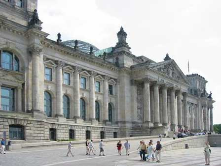 Berlino Reichstag